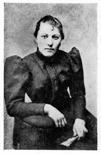 Photographie de Louise Barrant.